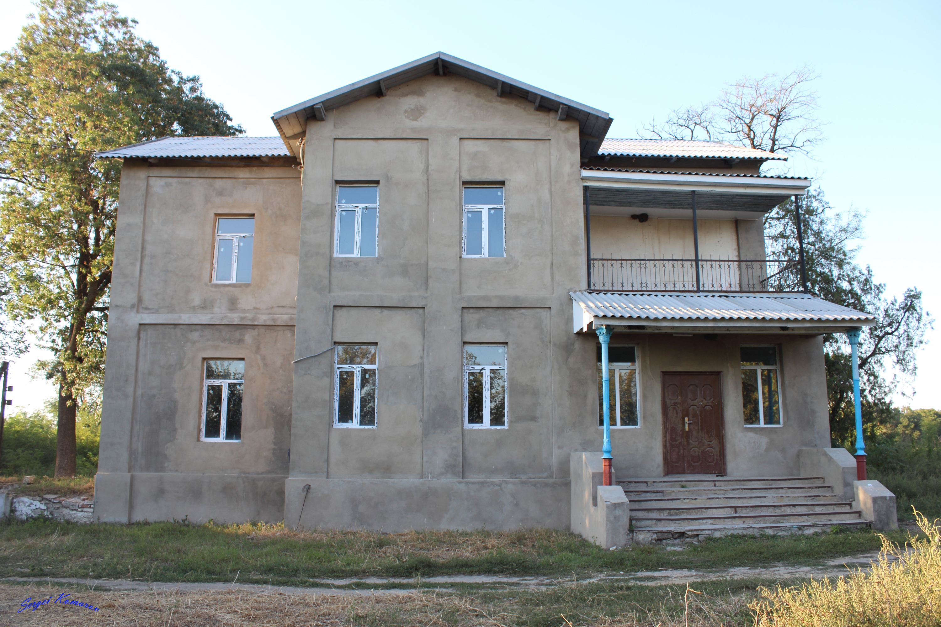 Особняк в настоящее время находится в процессе ремонта